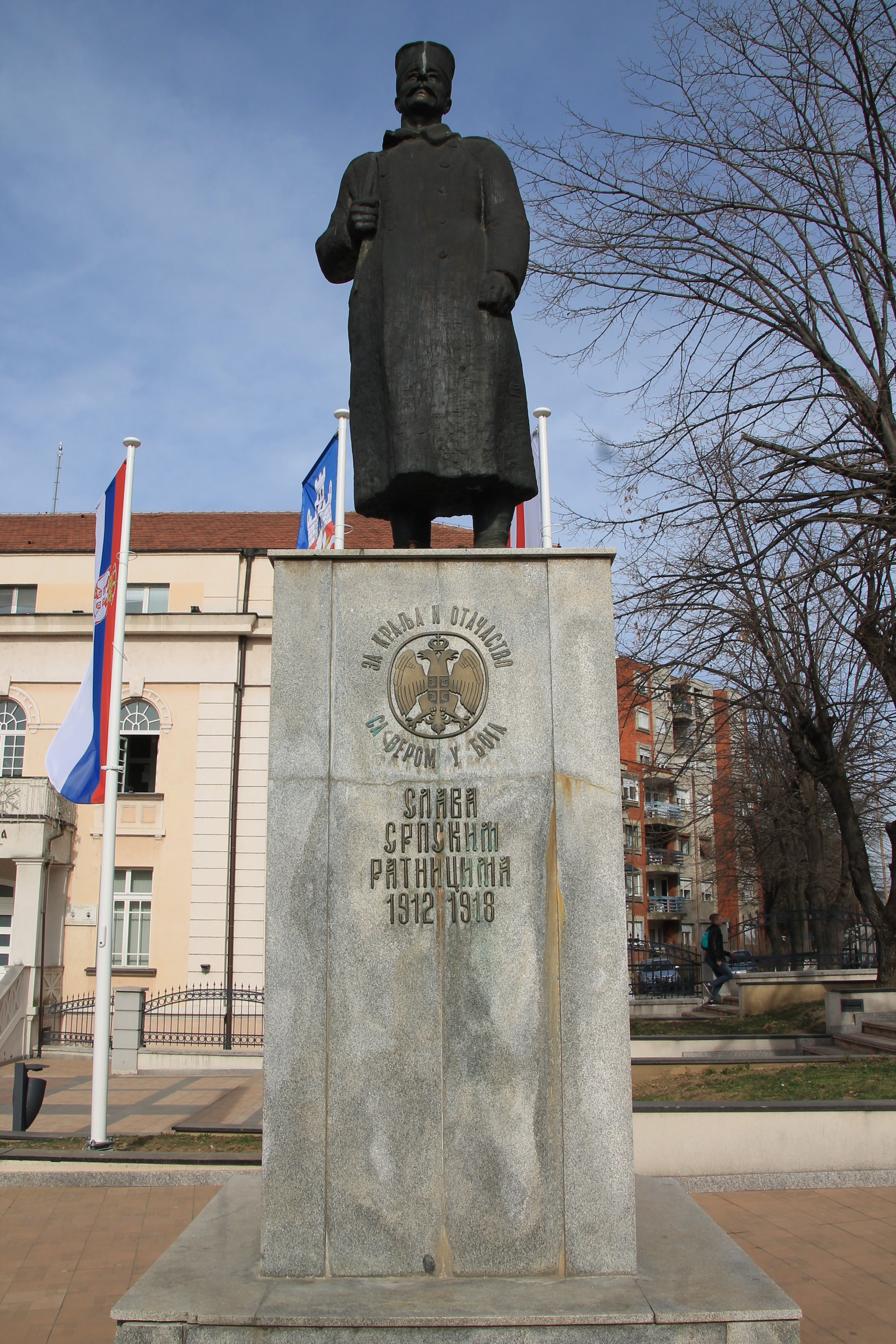 Spomenik srpskom ratniku